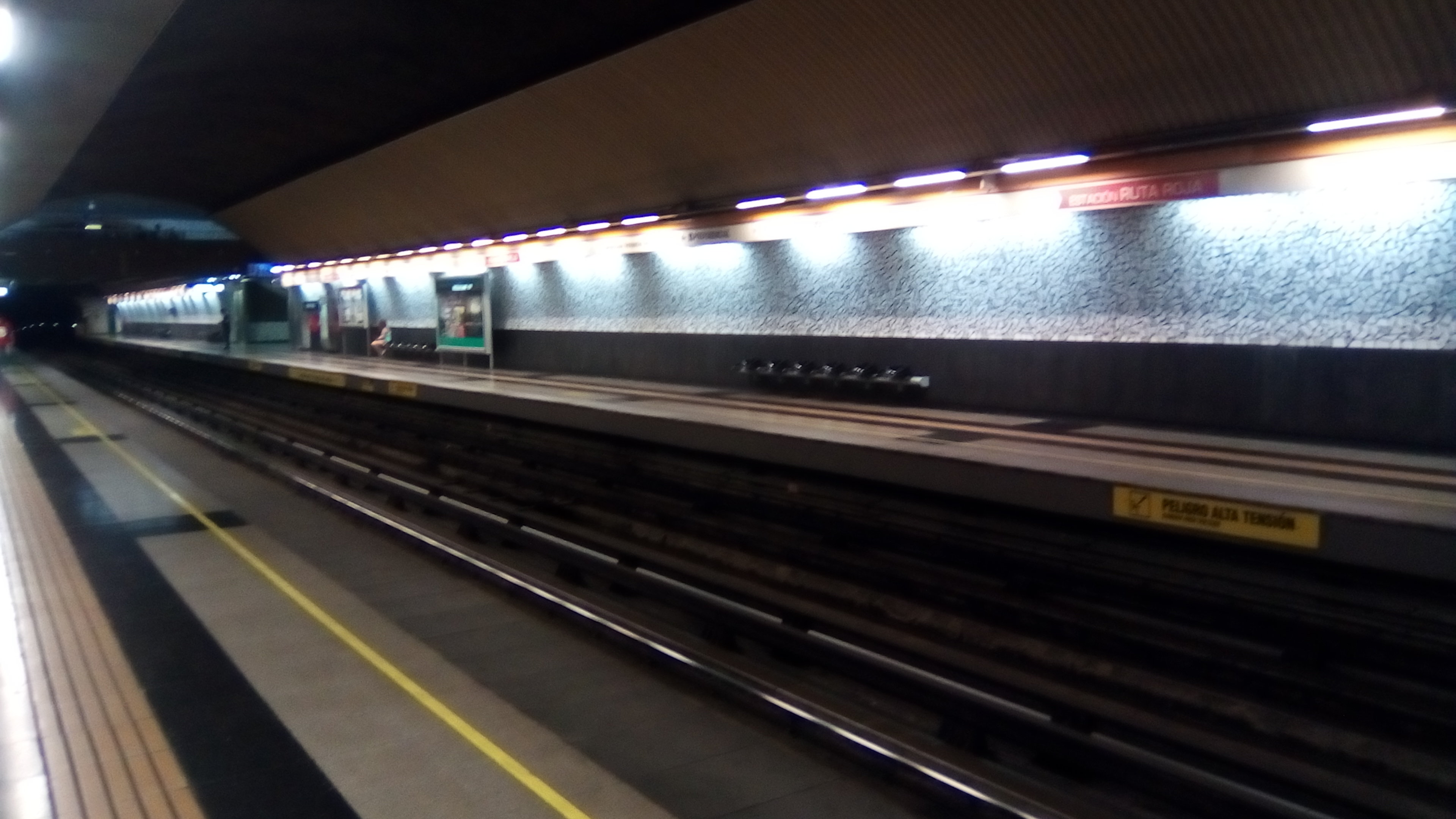 Estación Cementerios